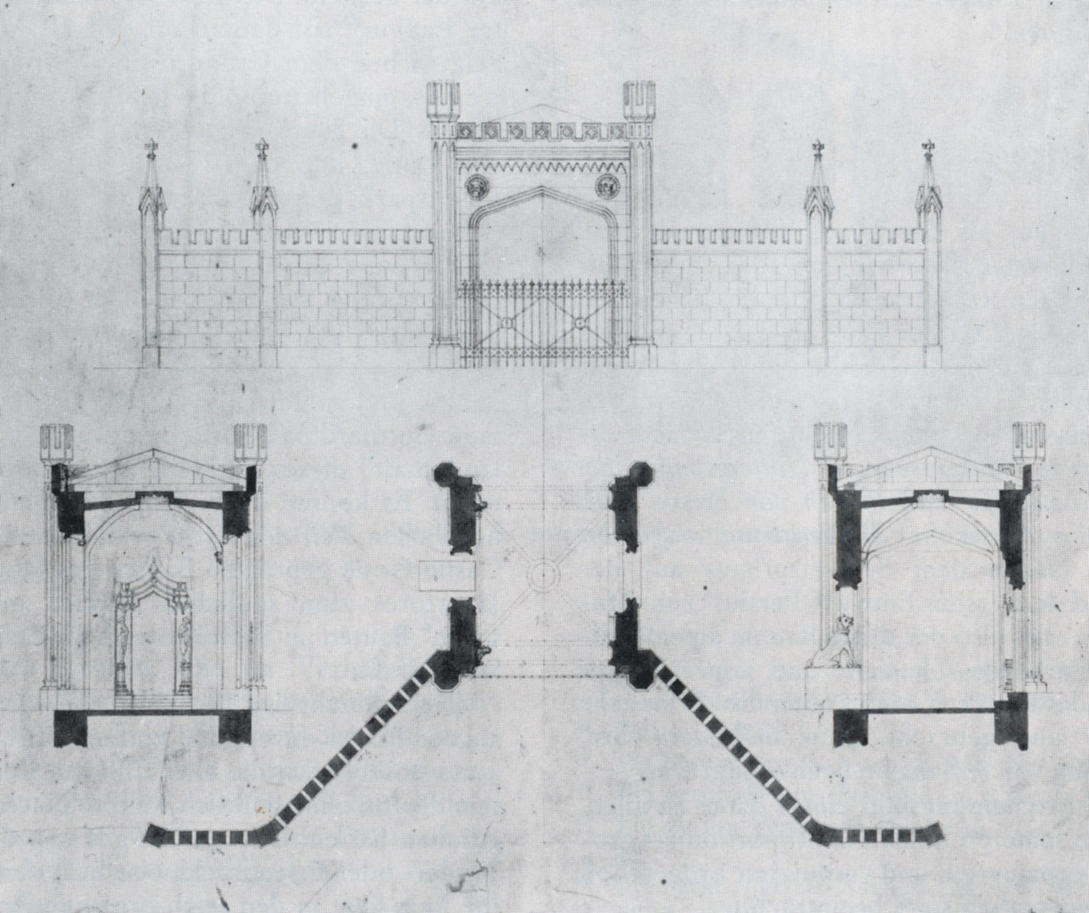 Klein-Glienicke, Jägertor, Entwurf von Ludwig Persius, um 1840